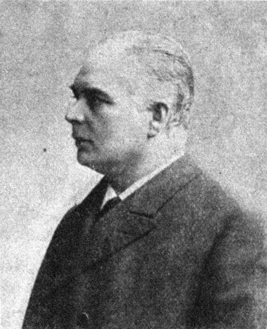 Österreichischer Politiker, Reichsratswahl 1907, Name siehe Dateiname